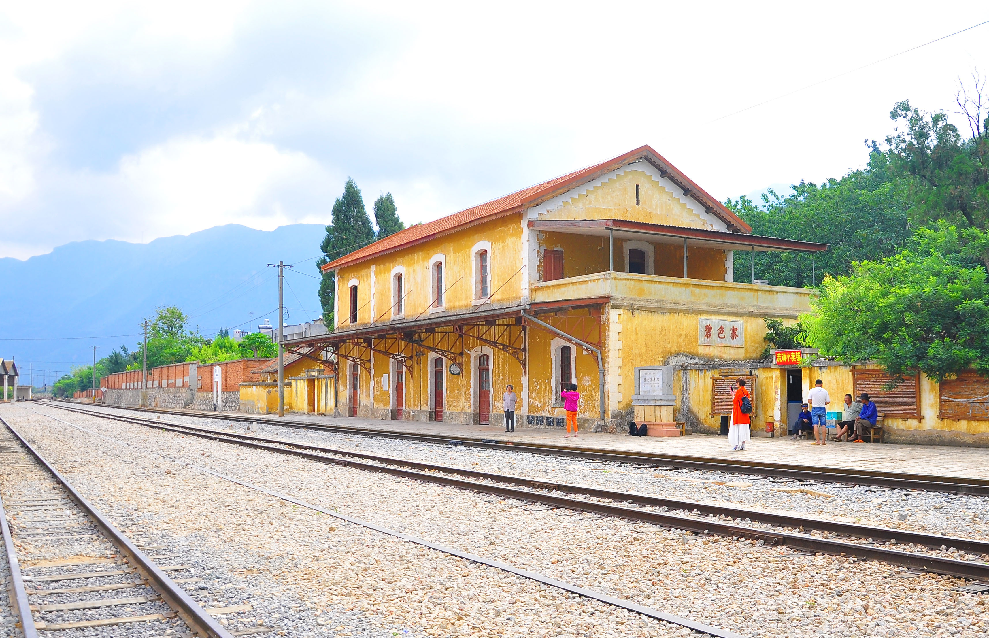 位于云南省红河州蒙自市北部的碧色寨车站。